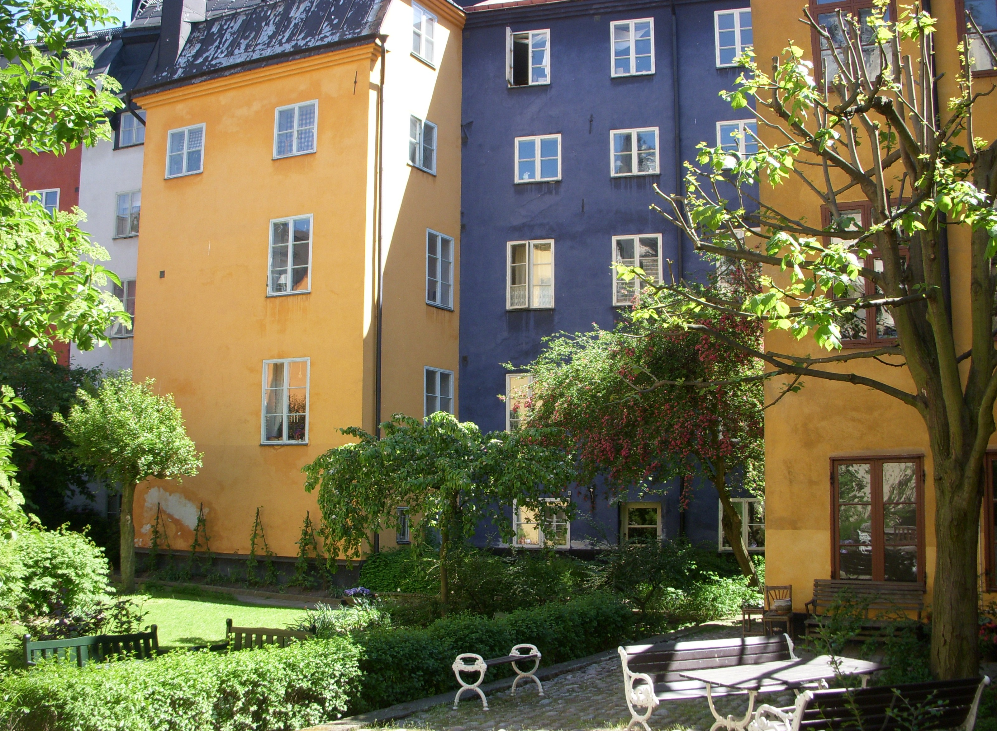 Kvarteret Cepheus i Gamla stan, Stockholm